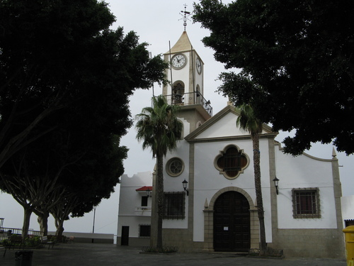 la iglesia de Chio